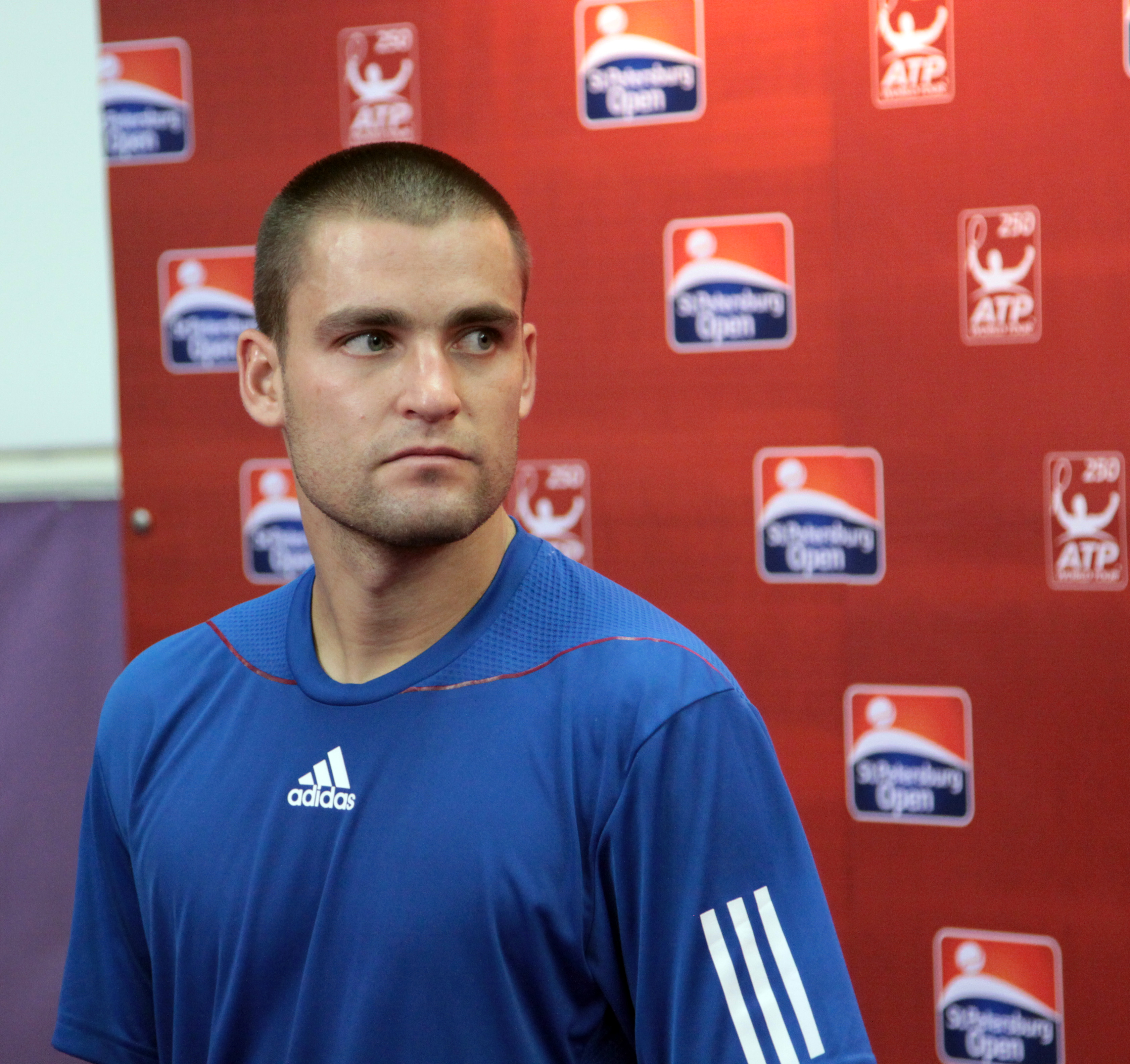 Михаил Южный на SpbOpen 2010